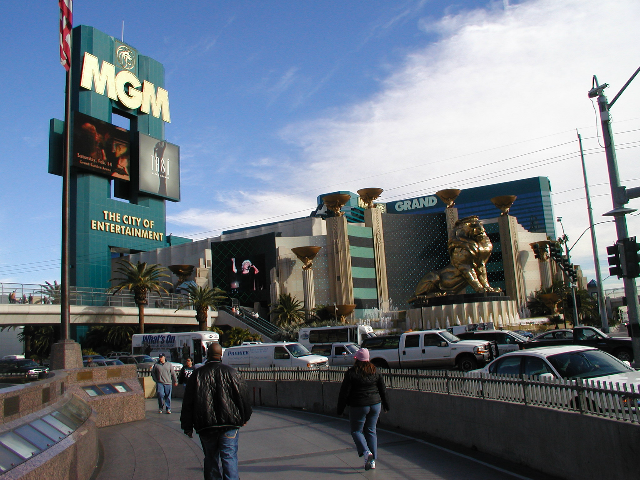 Foto tirada por mim (Vicente Sloboda) no começo de 2004. Na cidade de Las Vegas na Las Vegas Boulevard, mais conhecida como "STRIP". Nesta avenida ficam localizados os maiores cassinos da cidade.